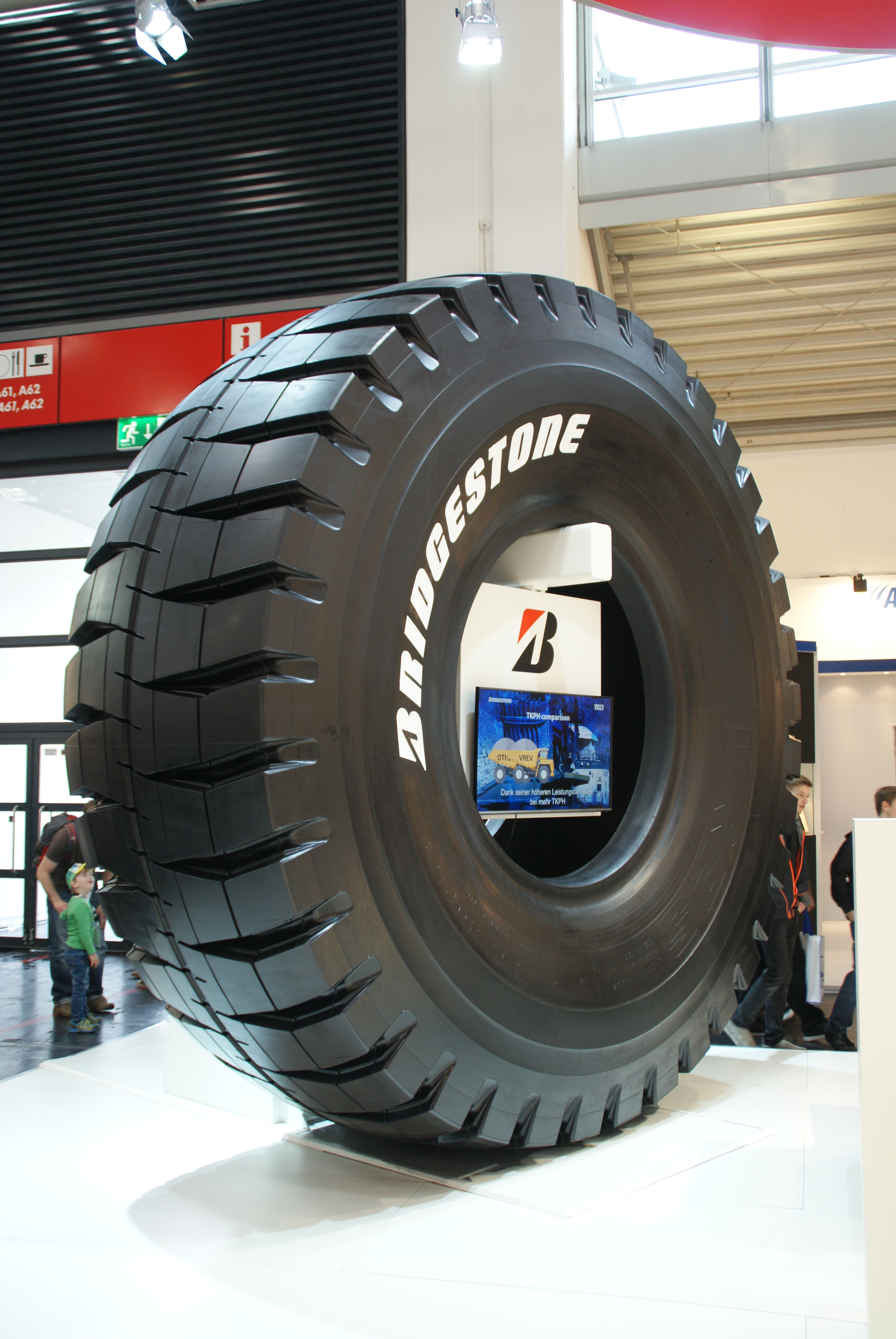 Bridgestone-Reifen für Baumaschinen